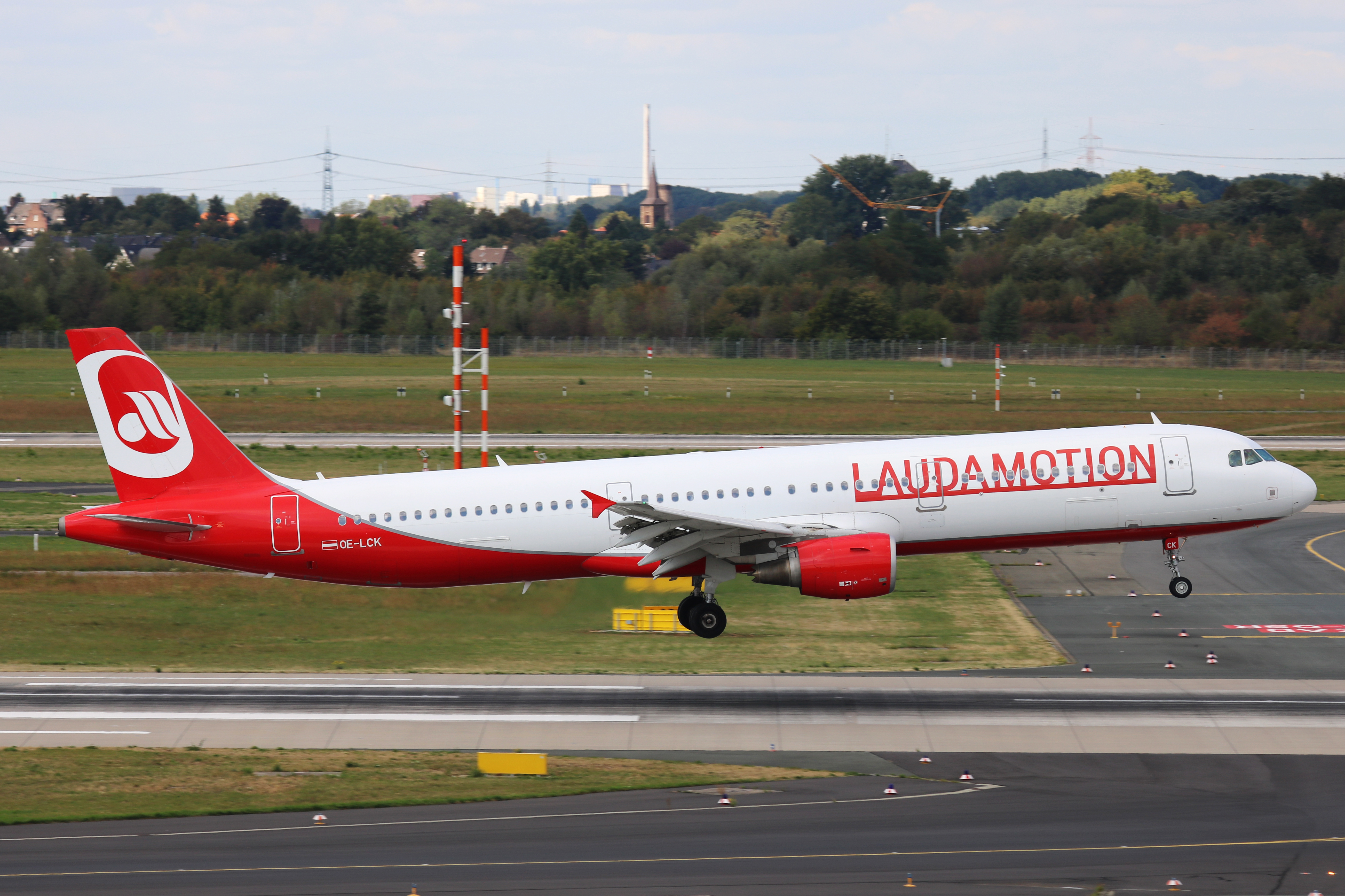 Flughafen Düsseldorf, Airbus A321-200 (OE-LCK) der Laudamotion